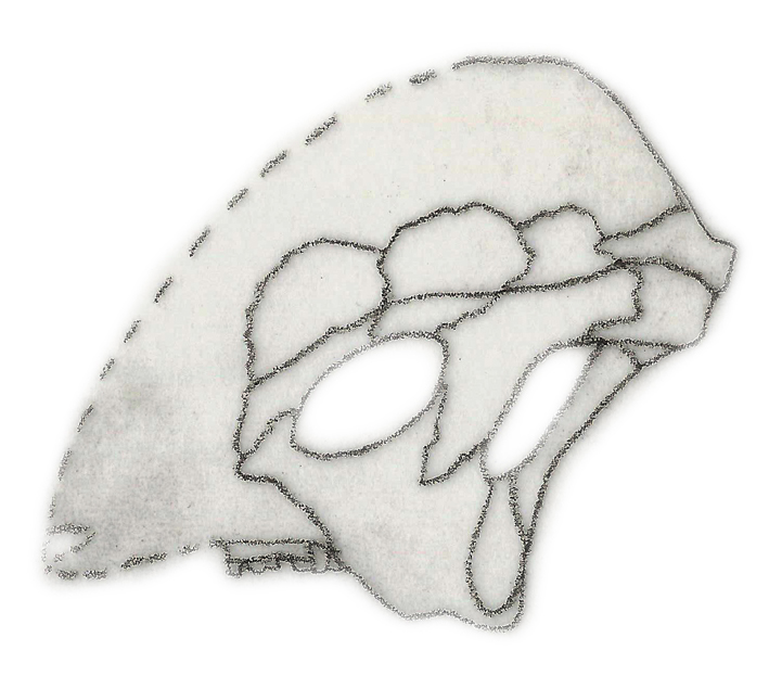 Illustration of a fossil of Tylocephale